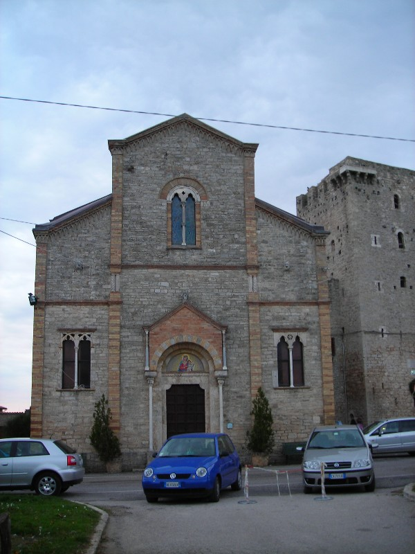 church of St Mary of Agello, in frazione Grutti, Gualdo Cattaneo, Perugia, Umbria, Italy